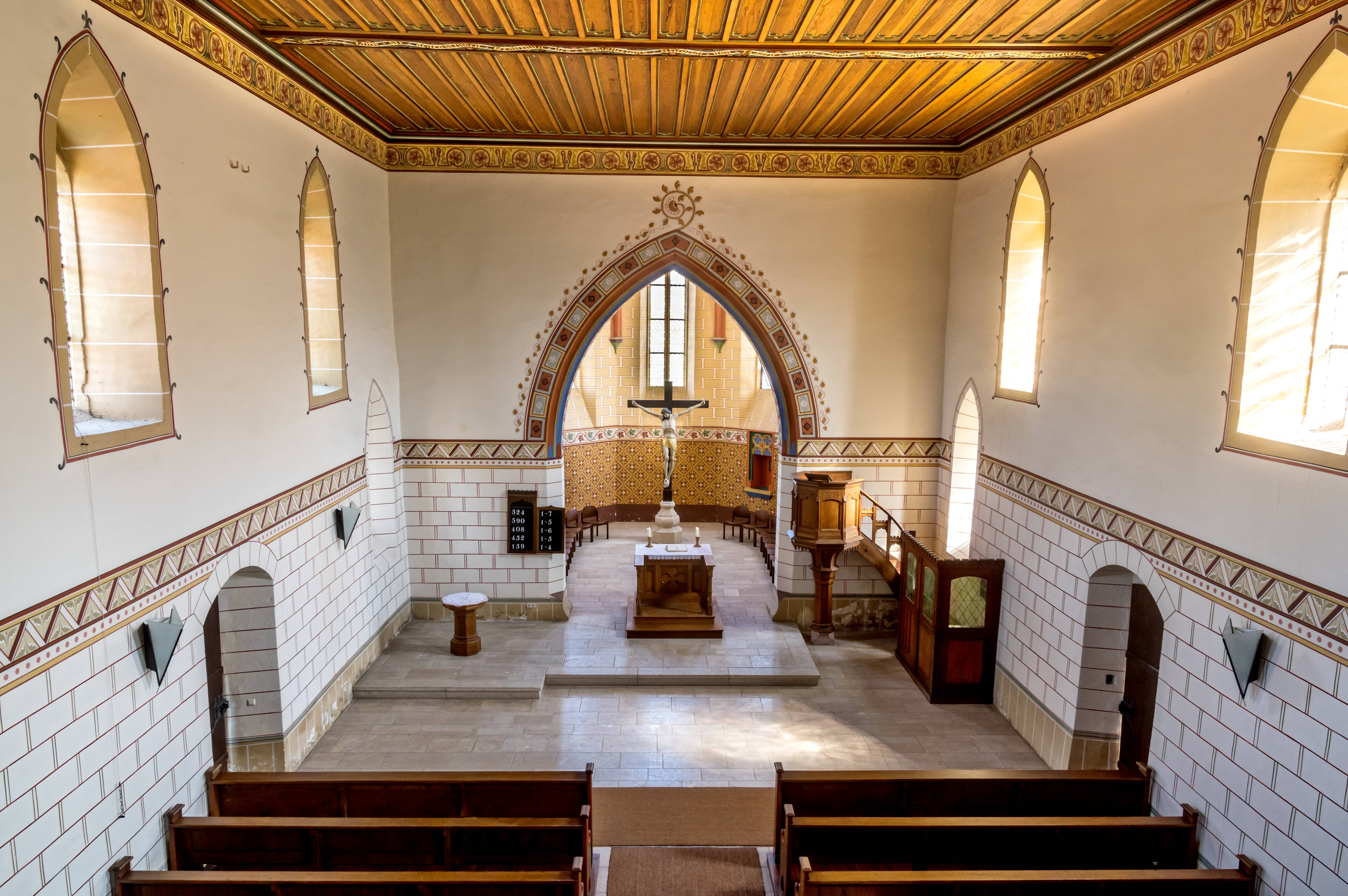 St. Aegidien in St. Ilgen einem Teilort von Laufen Blick zum Chor